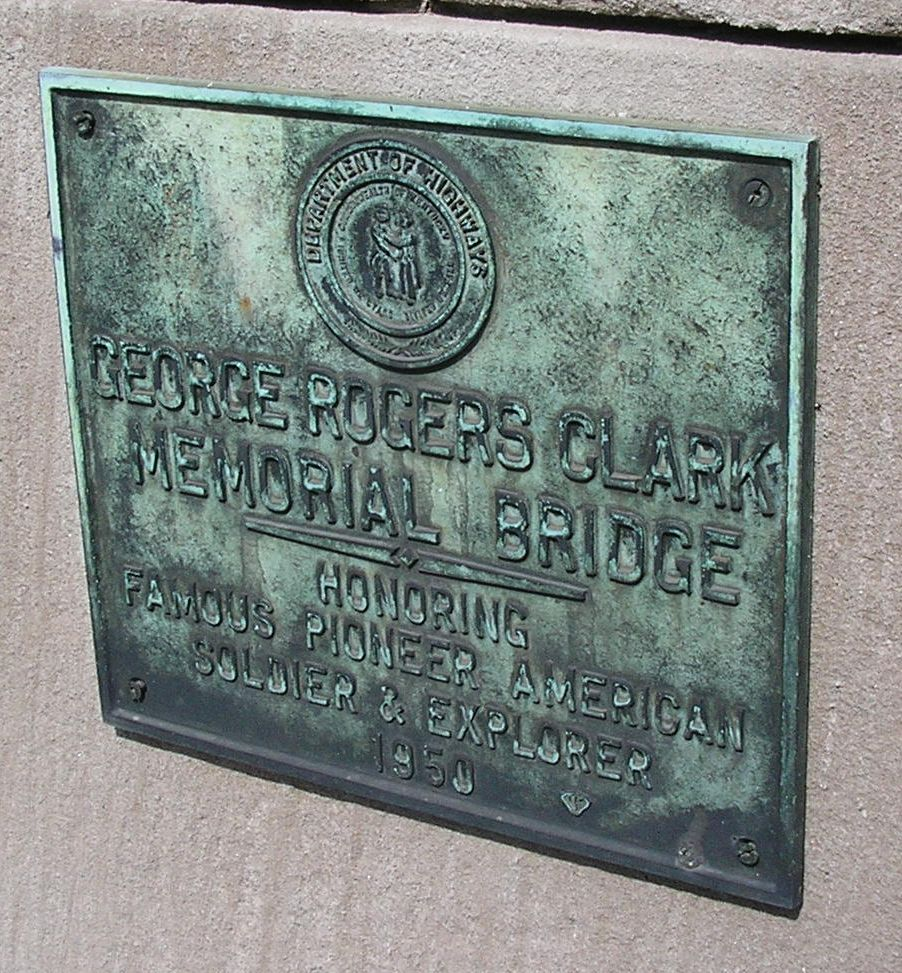 Clark Memorial Bridge dedication plaque in Louisville, KY USA